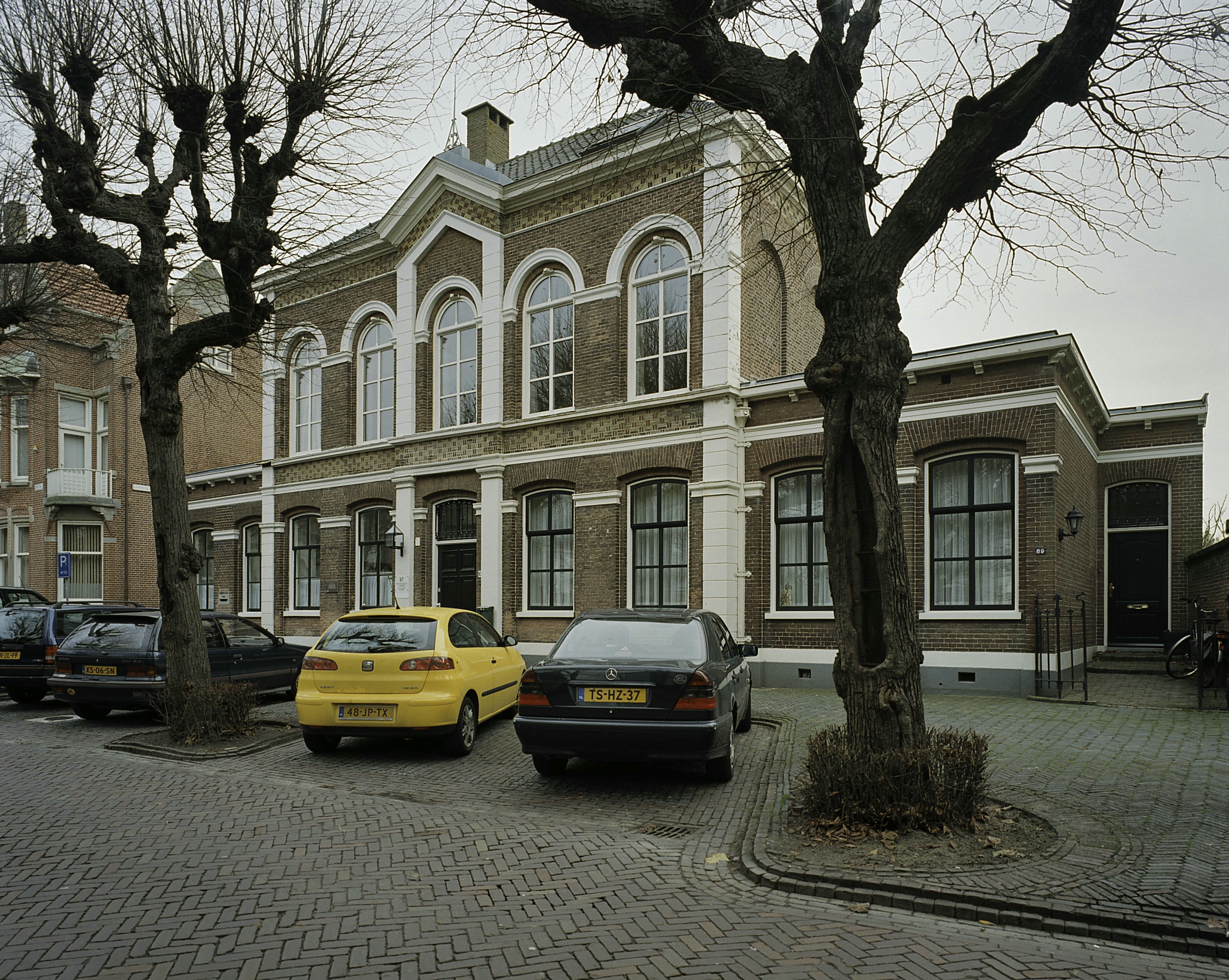 Kantongerecht: Overzicht voorgevel met een middenrisaliet en hoekpilasters (opmerking: Gefotografeerd voor Monumenten In Nederland Zuid-Holland)